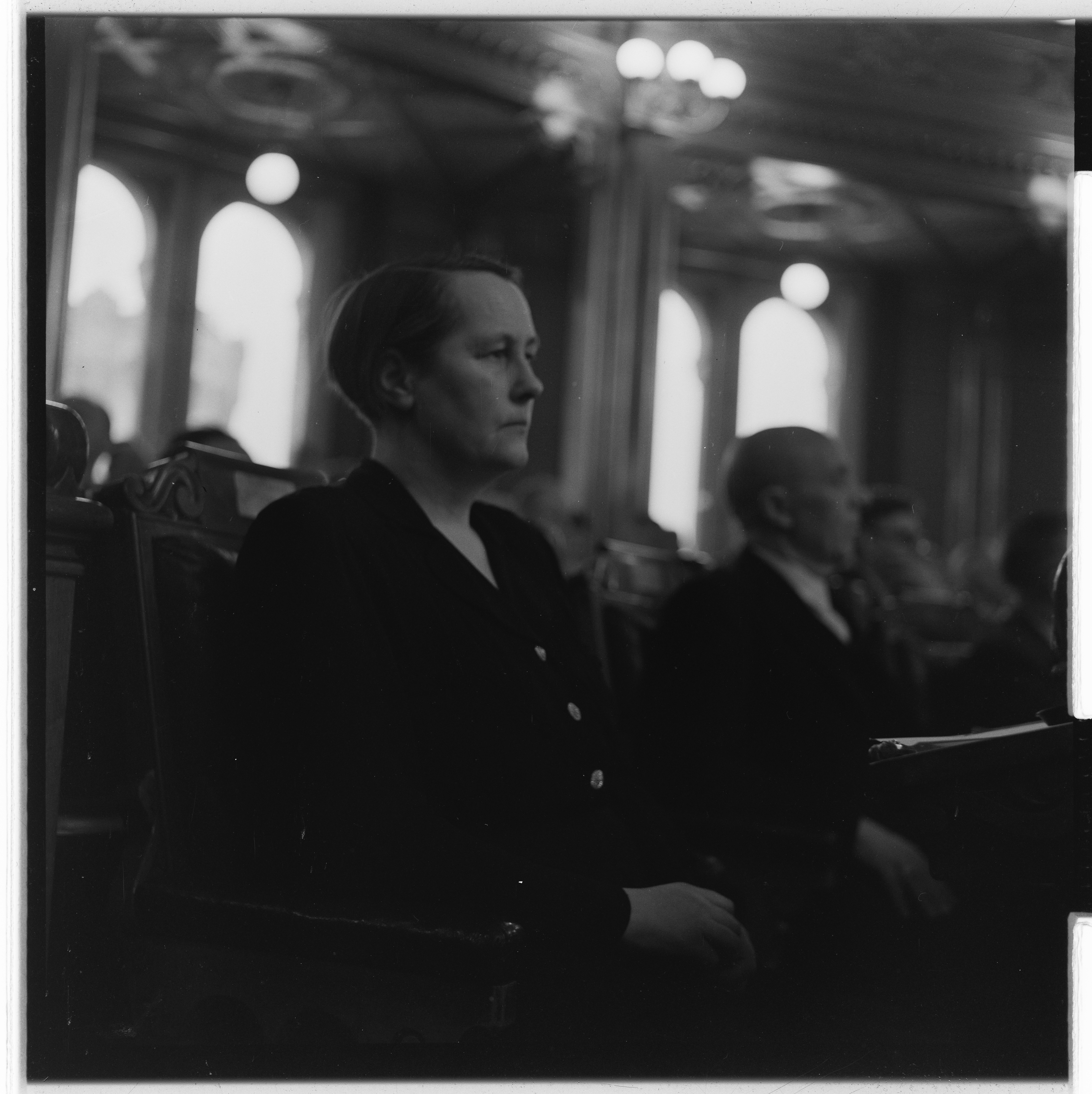 Bildet er hentet fra Arkivverket. Stortinget 1954. NÅ nr. 3, 1954. Arkivinstitusjon : Riksarkivet Arkivnavn : Billedbladet NÅ Sted : Norge, Oslo, Oslo, Stortinget Emneord: Stortinget, Menn Avbildet